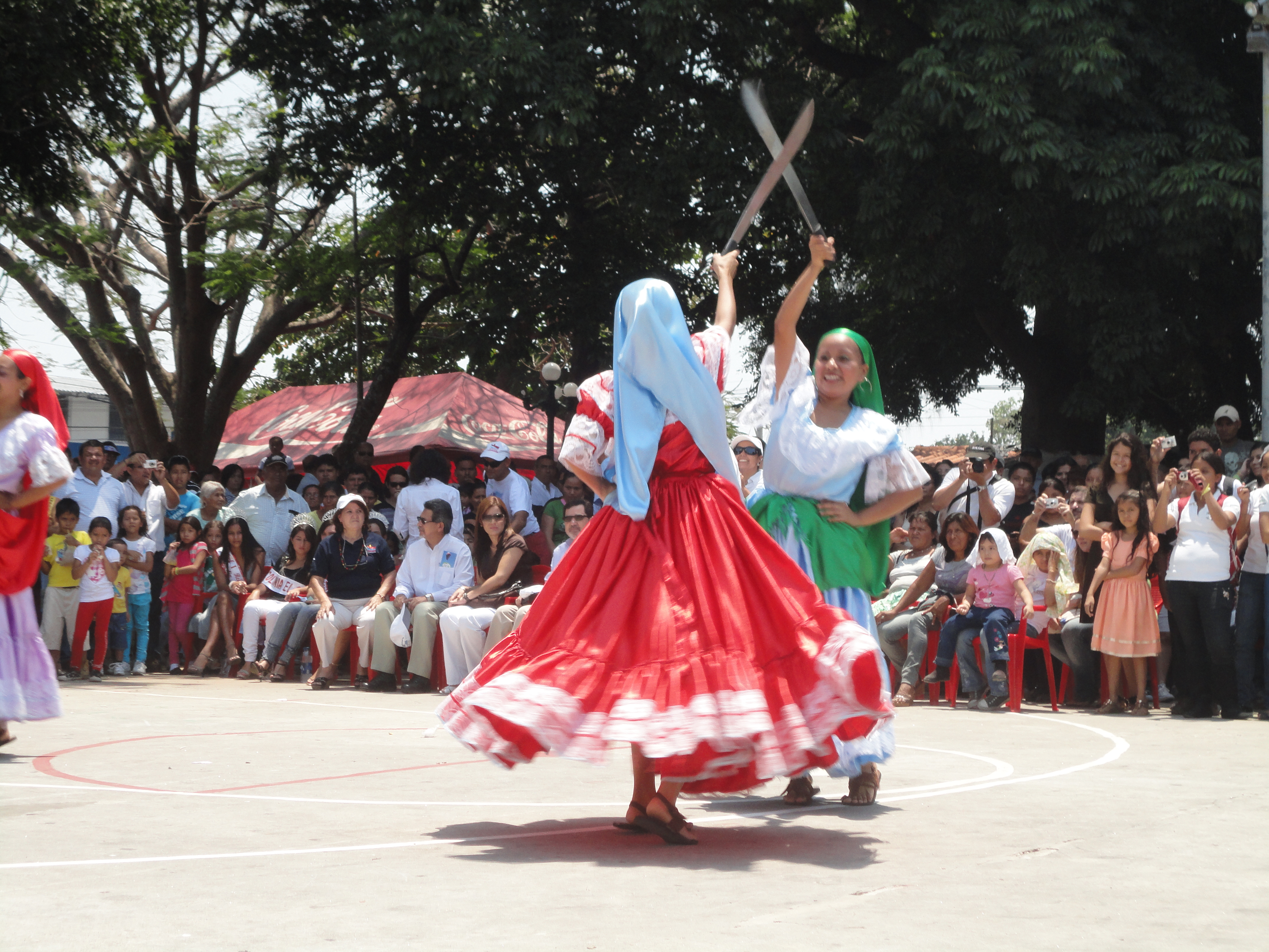 Danza Los Rozadores de caña, Festival de Globos de San Esteban Catarina.